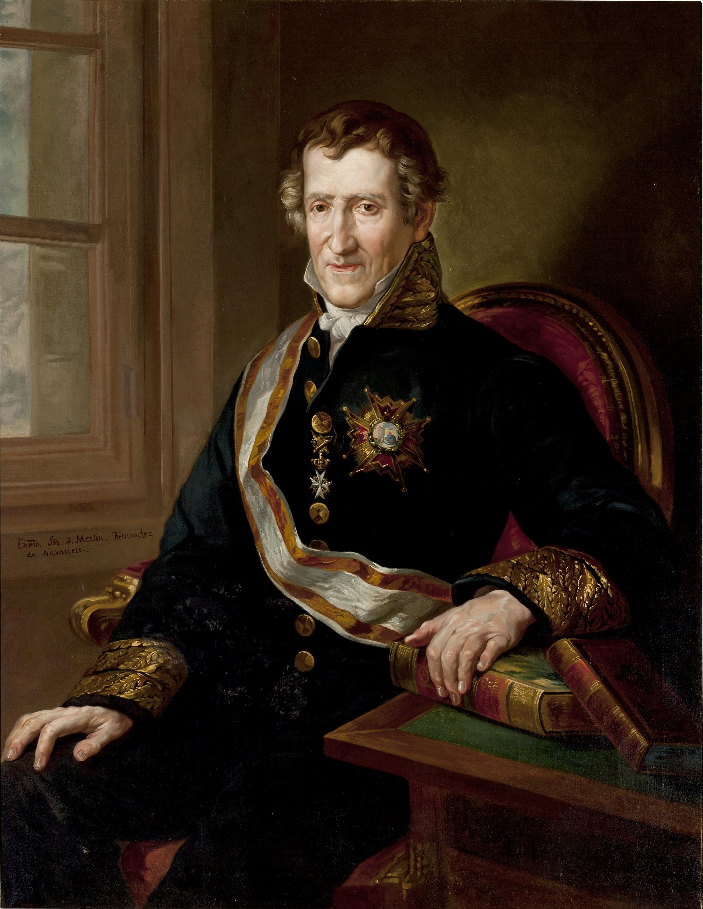 Portrait of Retrato del marino, escritor e historiador español Martín Fernández de Navarrete (1765-1844)